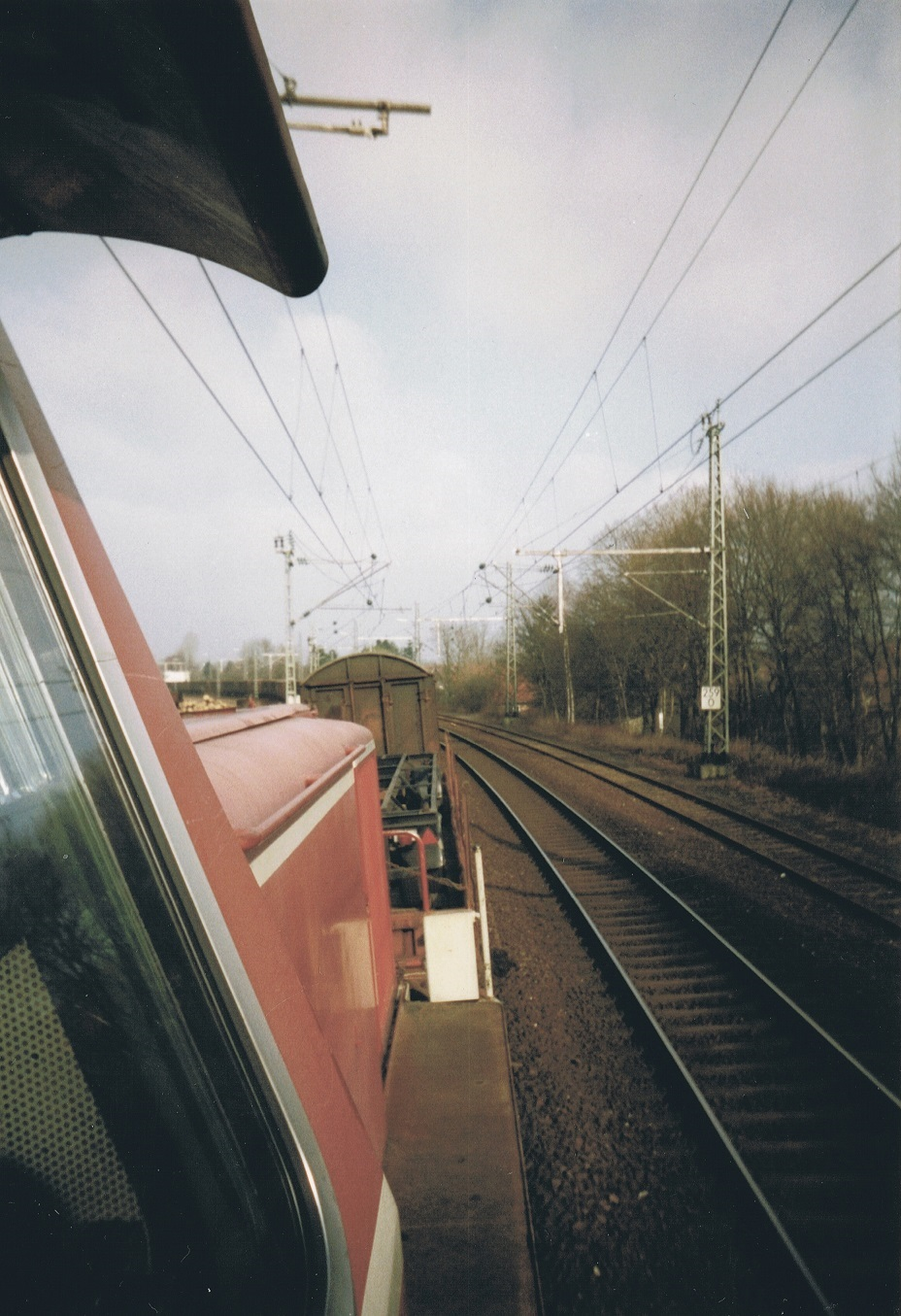 Übergabegüterzug aus Meppen mit Lok 291 004 im März 1997